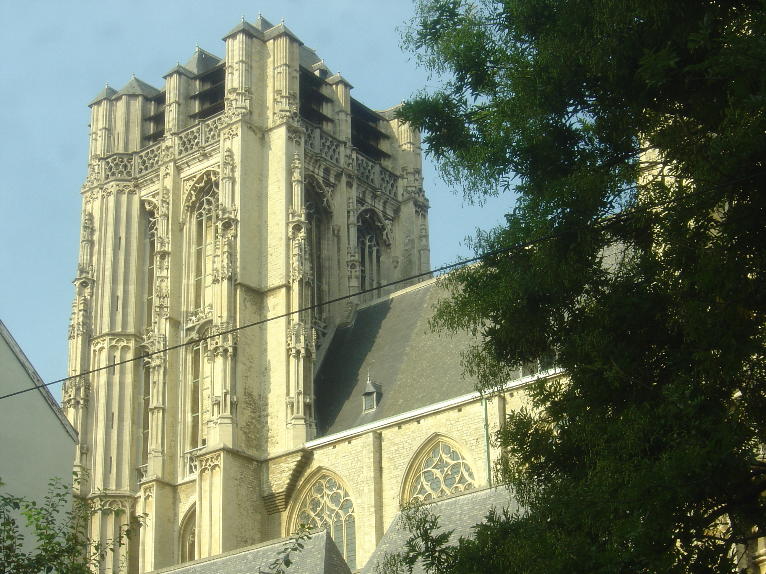 Η Εκκλησία Αγίου Ιακώβου στην Αμβέρσα, όπου έχει ενταφιαστεί ο Ρούμπενς